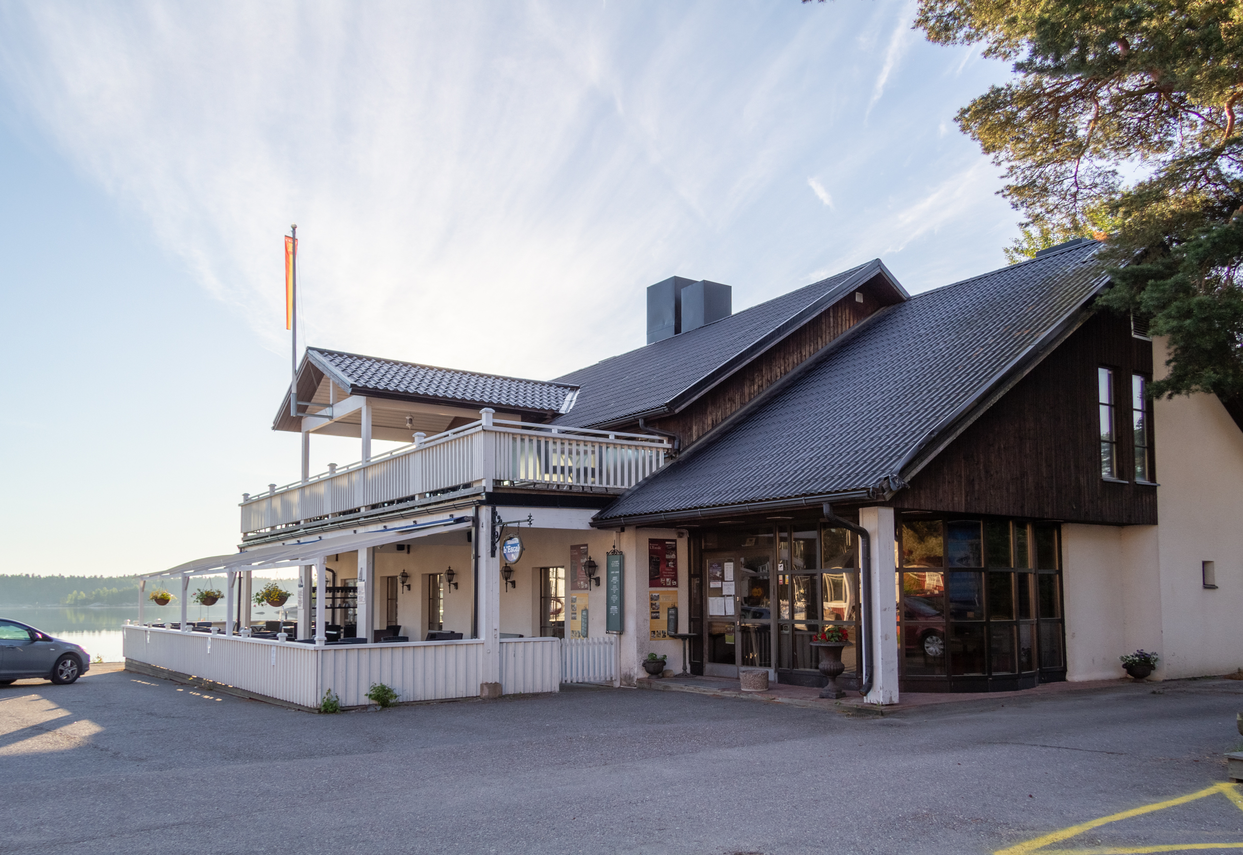 Bild på en av Nagus restauranger. Restaurant L'Escale vid Nagu Gästhamn, Norra Hamnen.